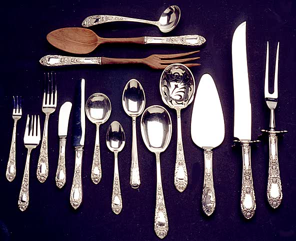 Silberbesteck (Sterling Silber) 1904, Fa. Kirk & Son